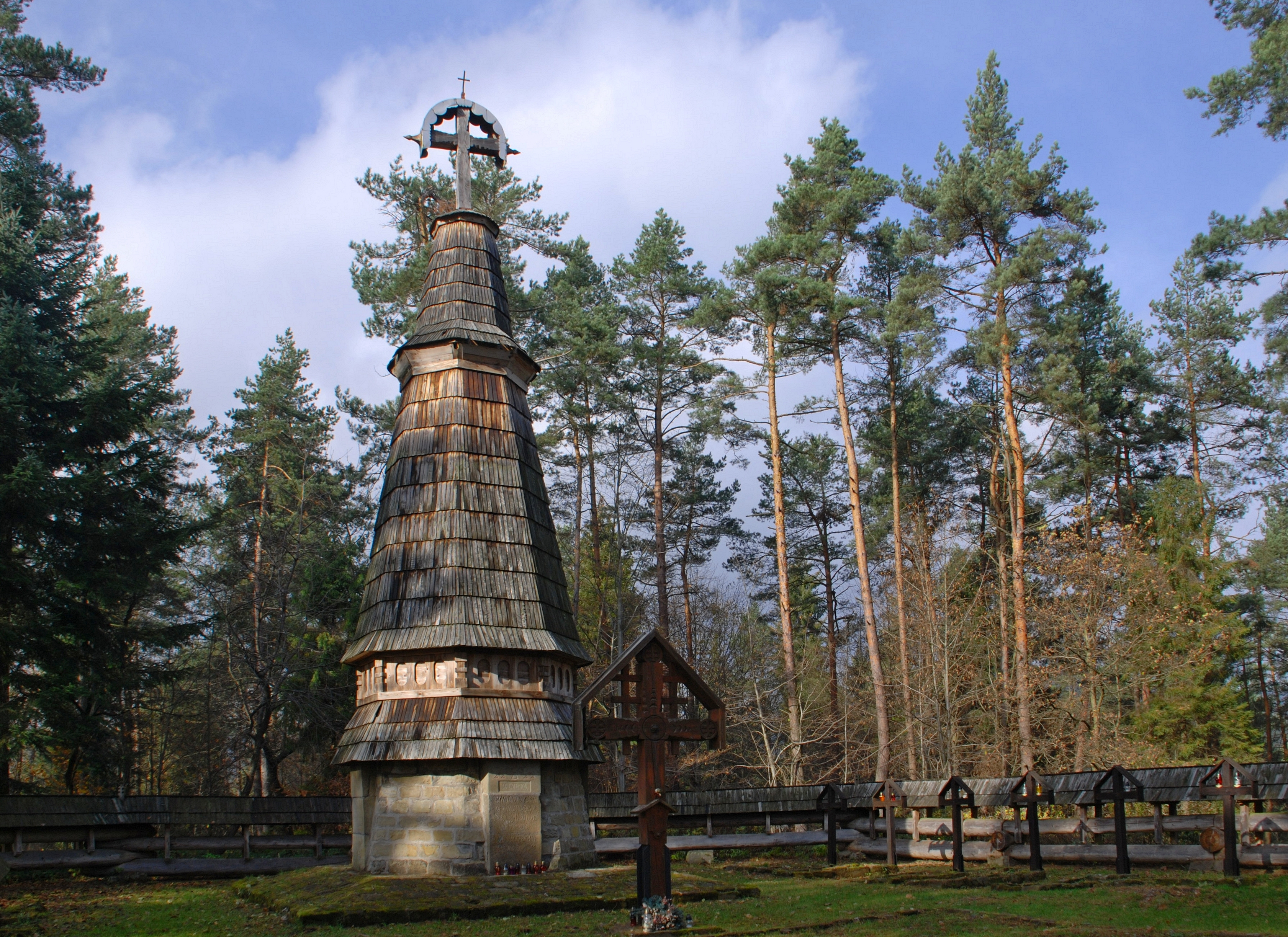 wieś Gładyszów